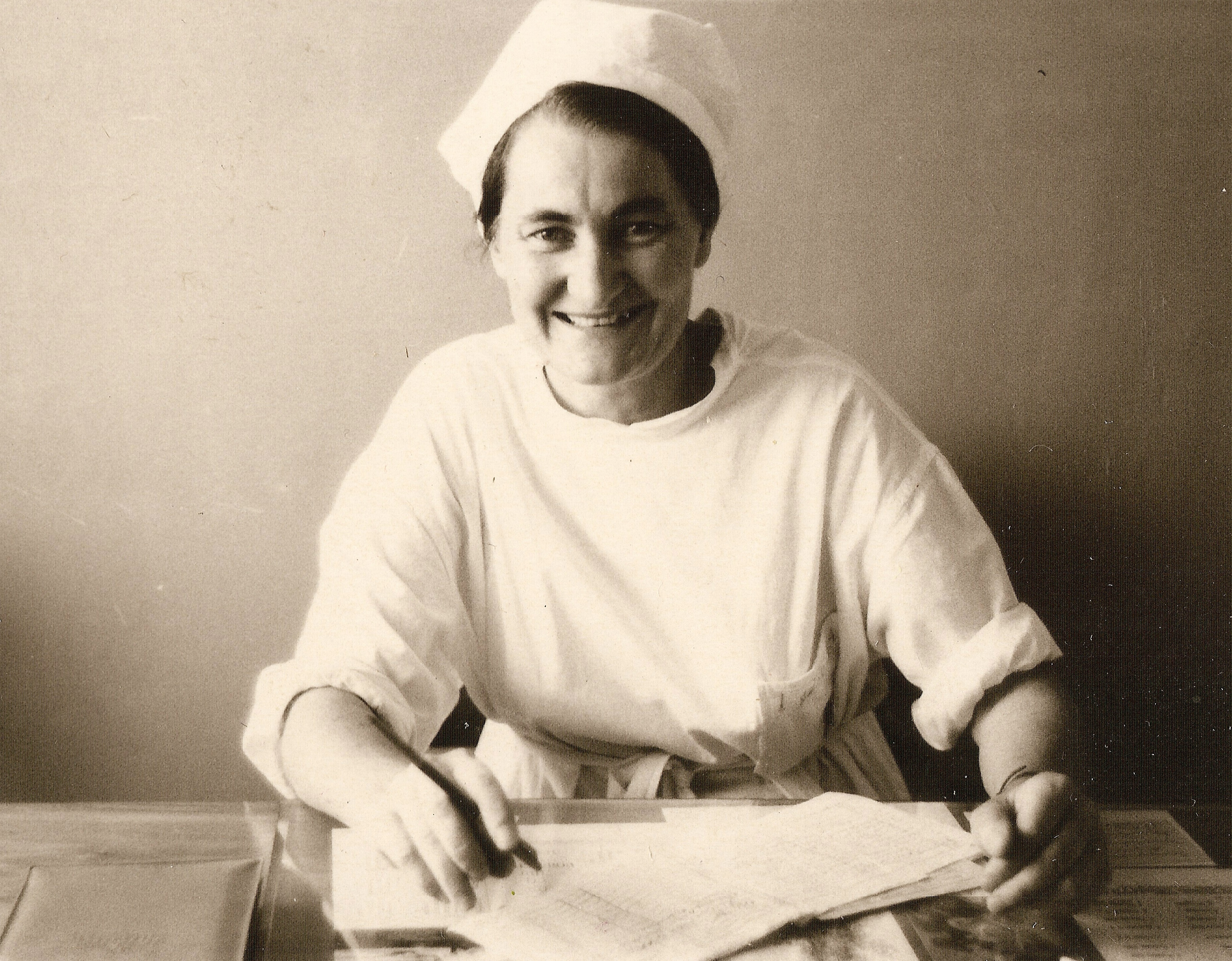 Александра Александровна в 1970 году